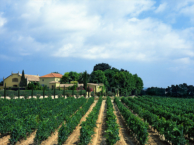 Mas La Plana